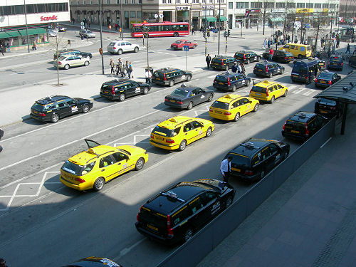 Taxi 020 på Stockholm Centralstation